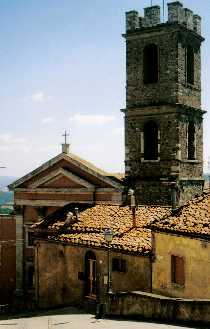 Chiesa di San Leonardo Manciano (GR), foto 20/07/2002